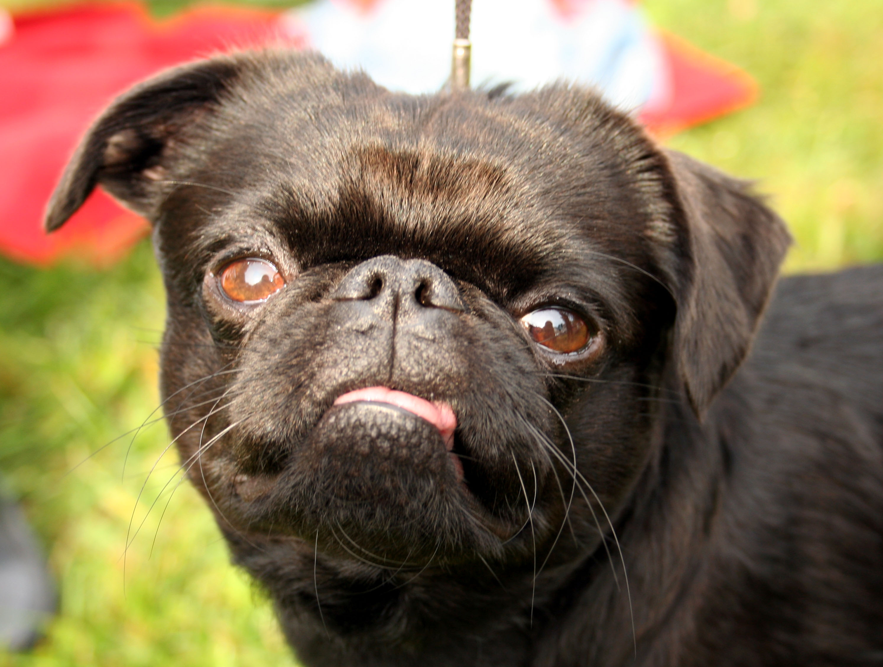 Brabantczyk